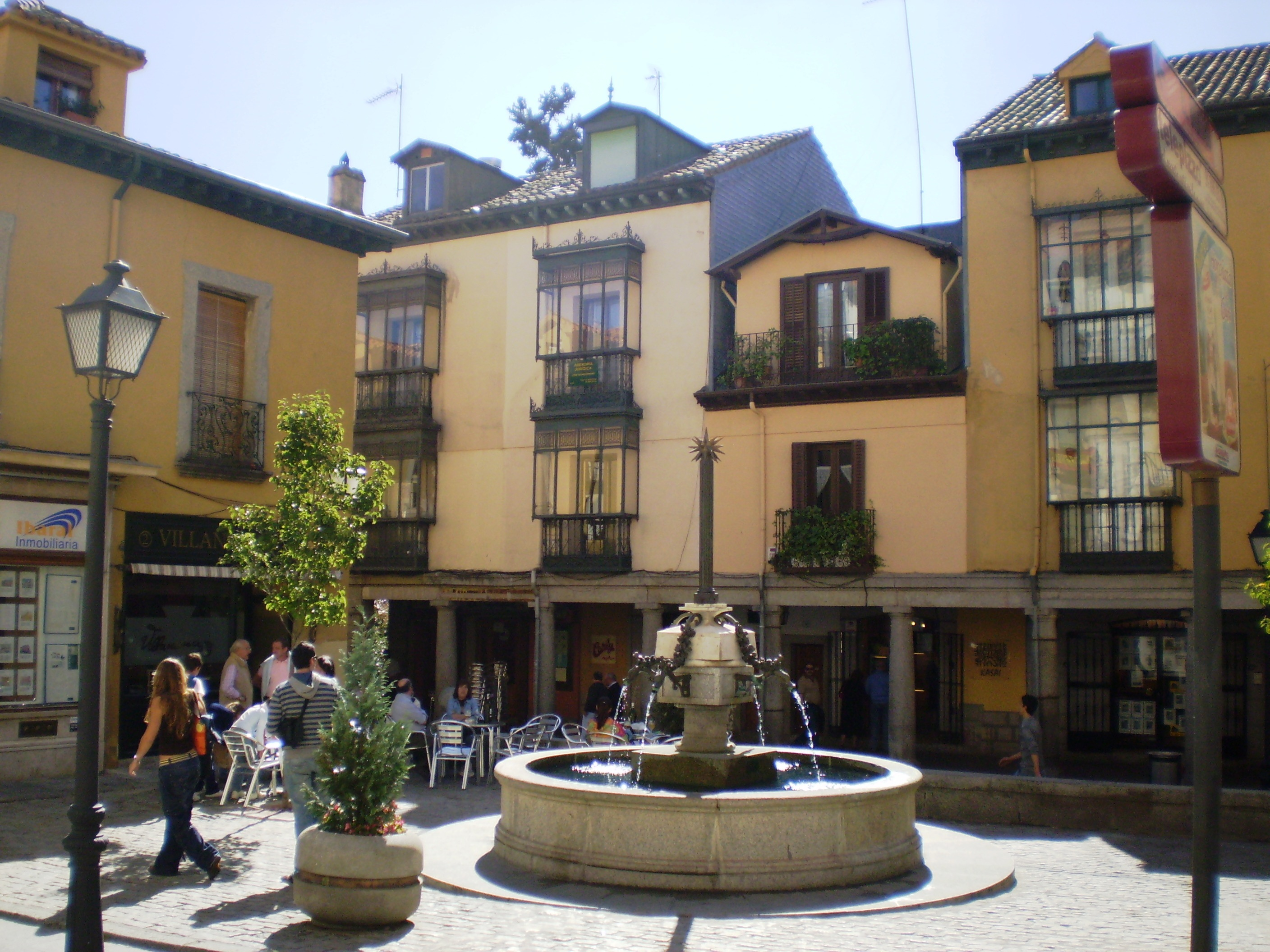 Cruz Square, San Lorenzo de El Escorial. Community of Madrid, Spain